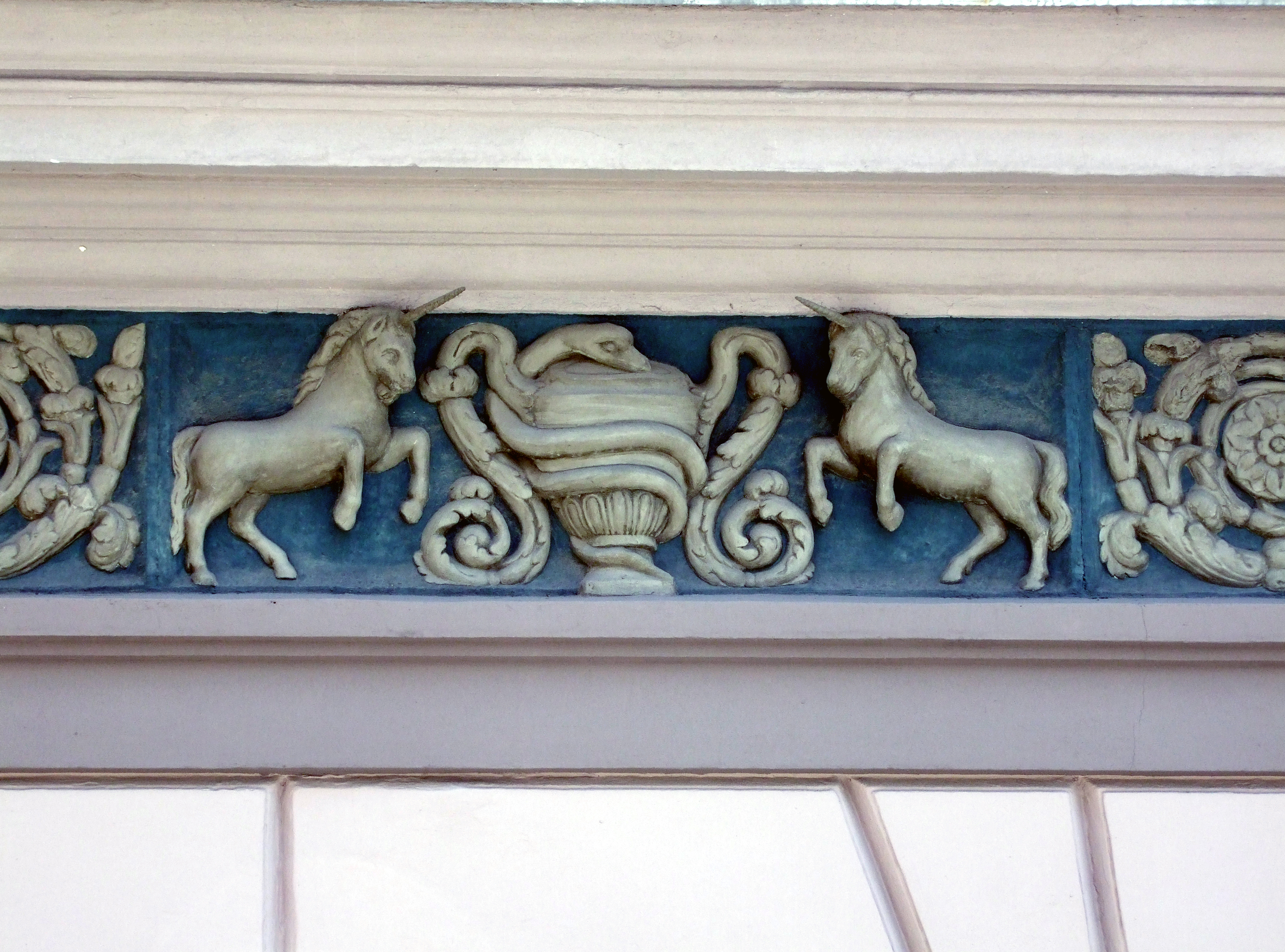 Die Einhornapotheke im oberschwäbischen Memmingen. Einhornrelief in der Front über dem Eingang